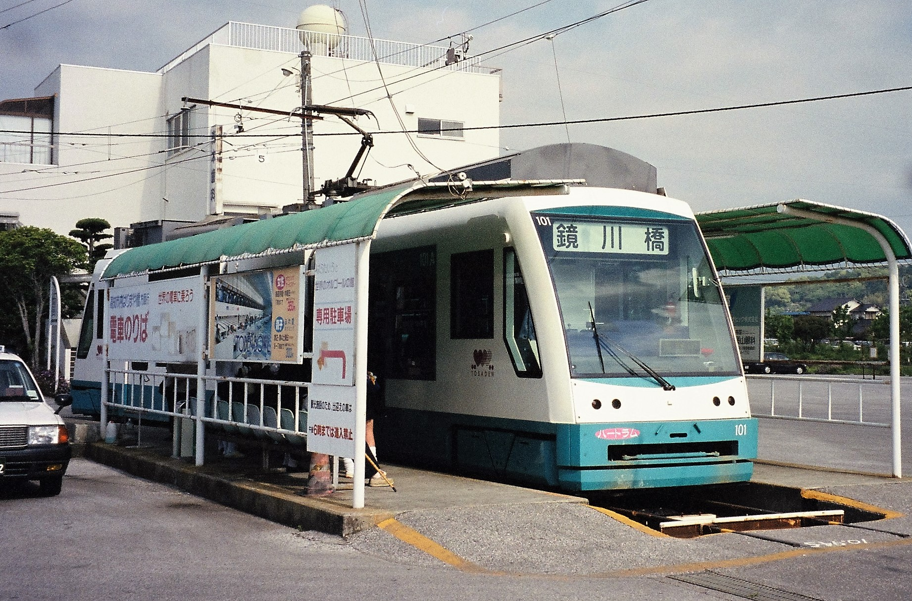 ローソン併設前の土佐電気鉄道（当時）後免町電停（2003年5月撮影）